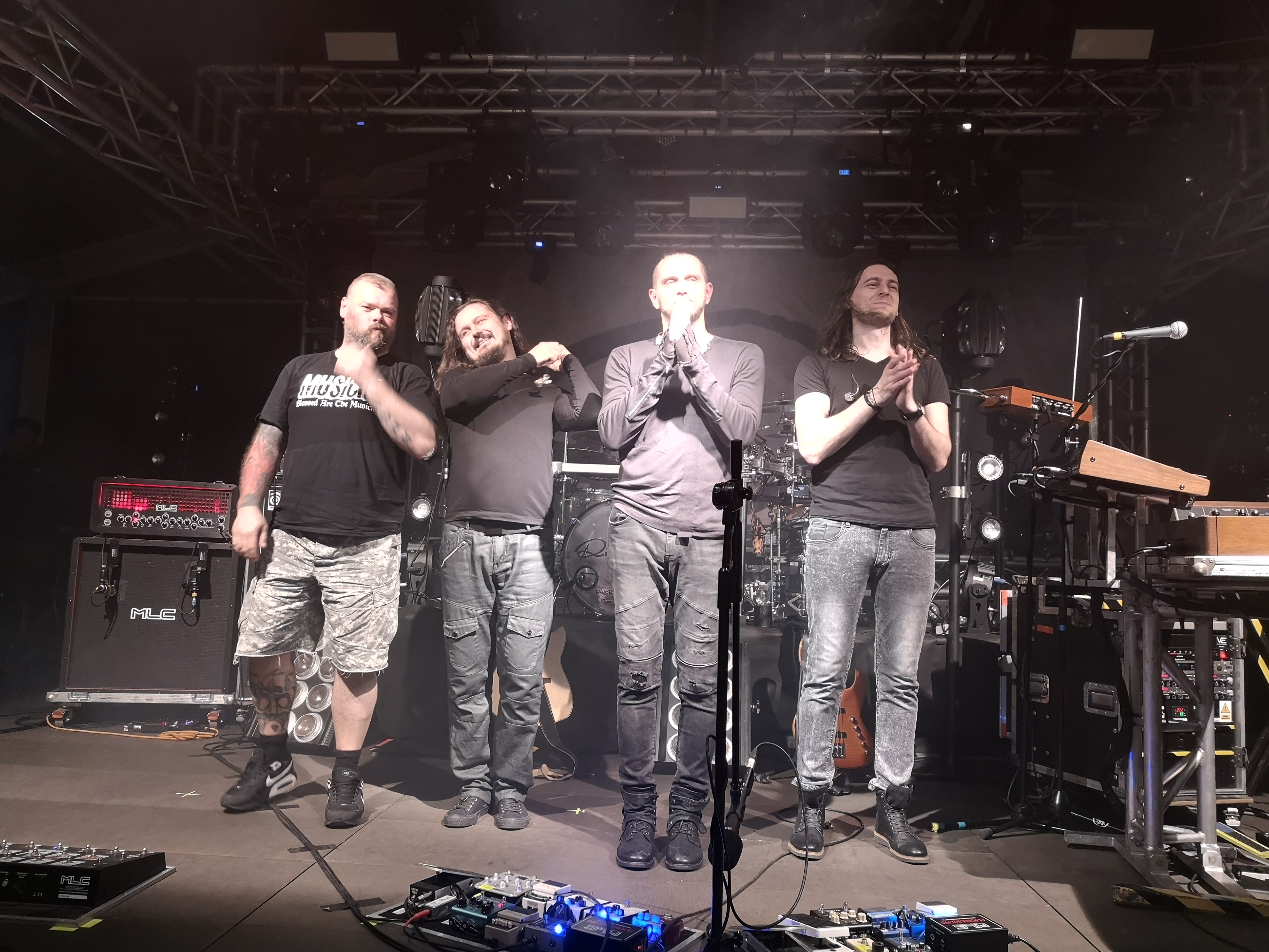 I Riverside al termine del concerto di Milano nel 2019